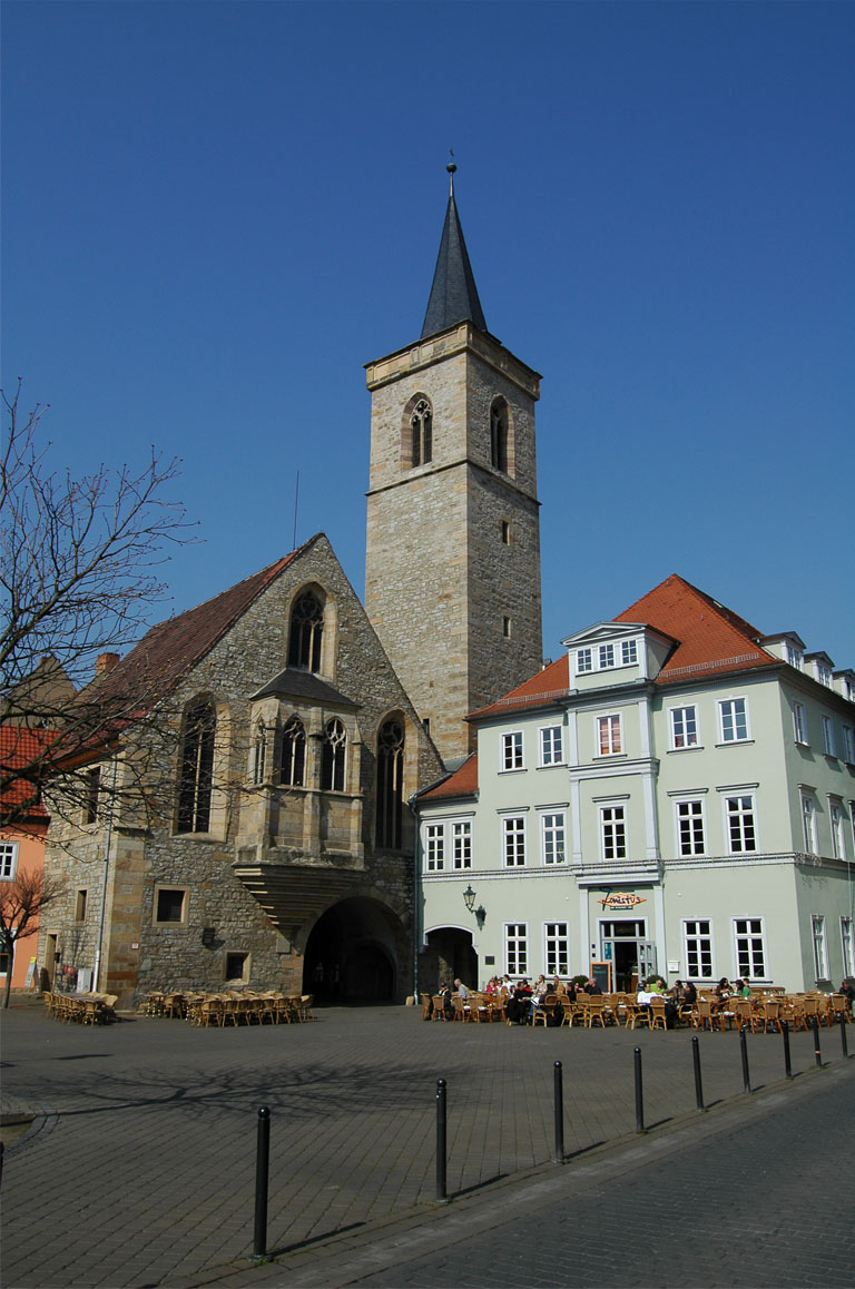 Ägidienkirche (erste Erwähnung 1110) am Wenige Markt in Erfurt